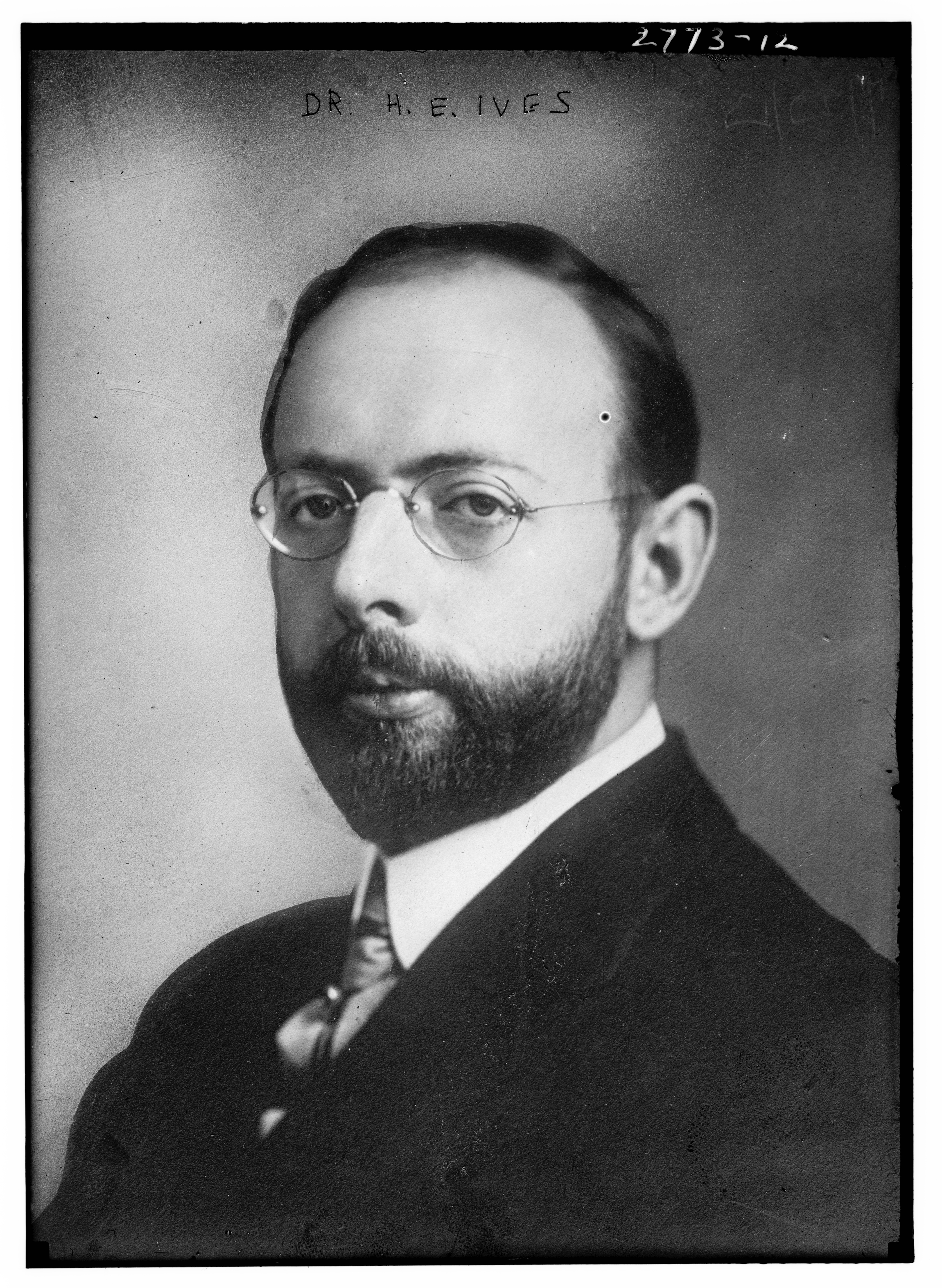 Herbert E. Ives. Físico estadunidense.